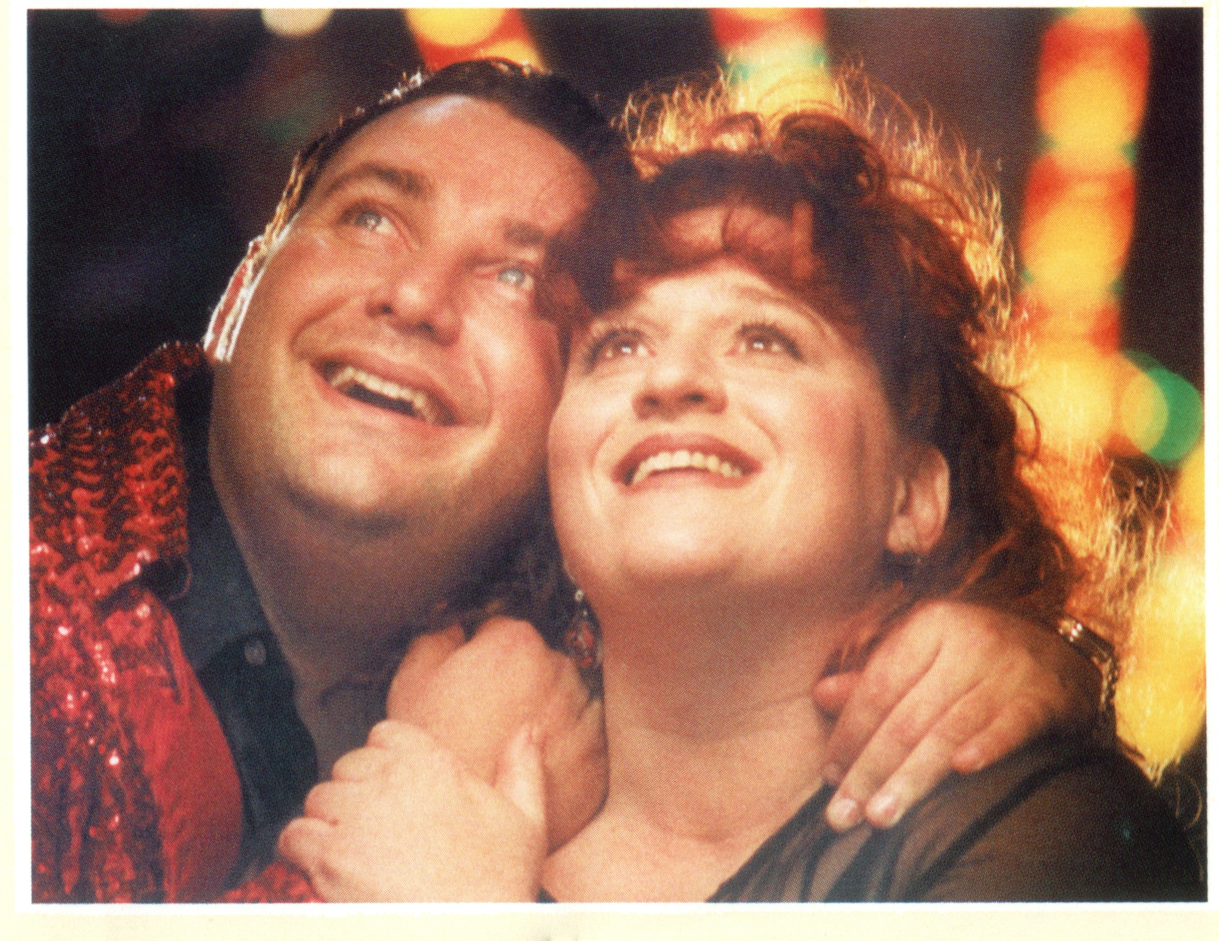 עפולה אקספרס צילום איציק פורטל